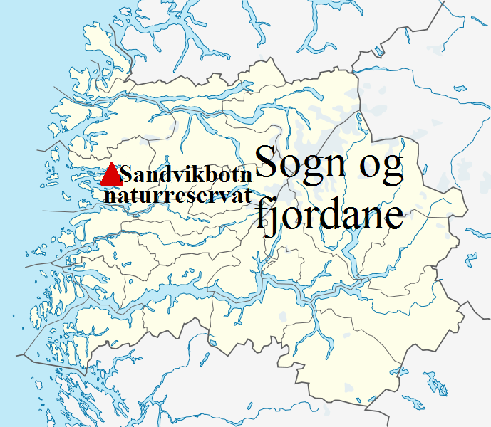 =Mer oversiktelig kart over reservatet